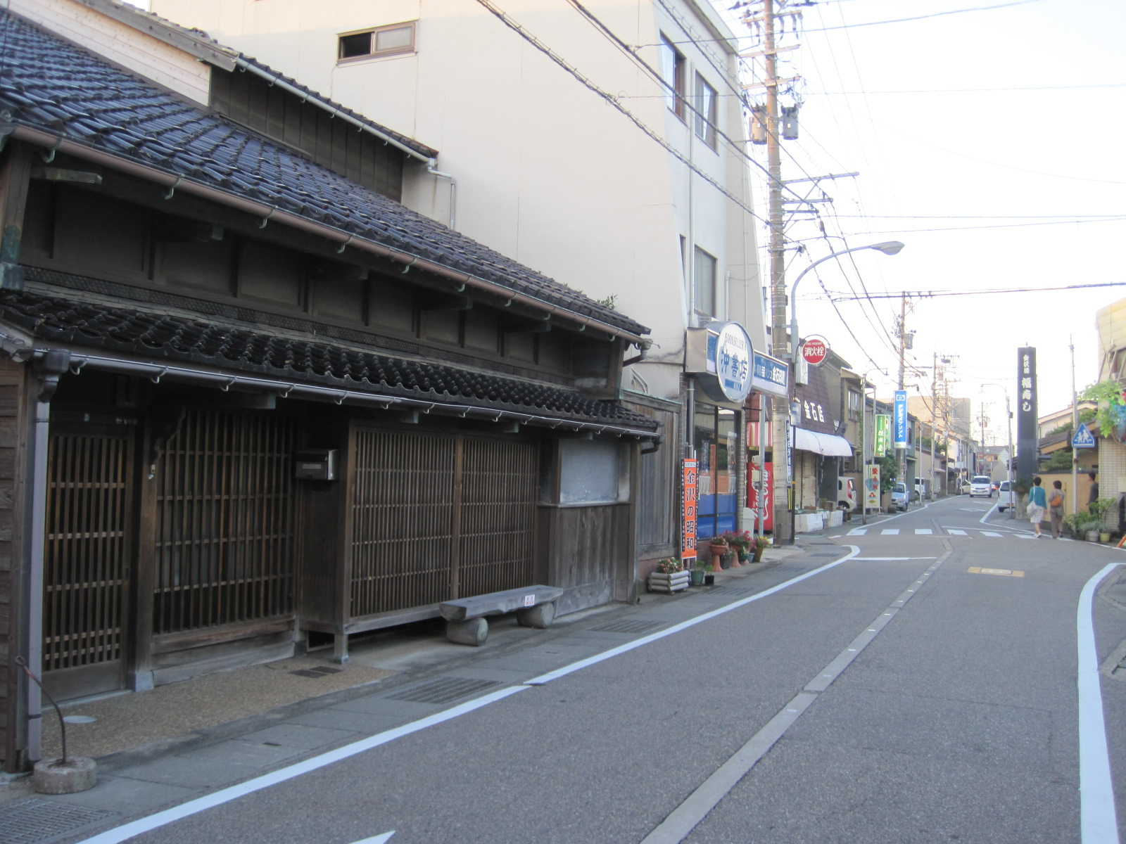 石川県金沢市金石の町中。